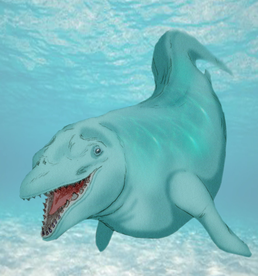 Restoration of Masracetus